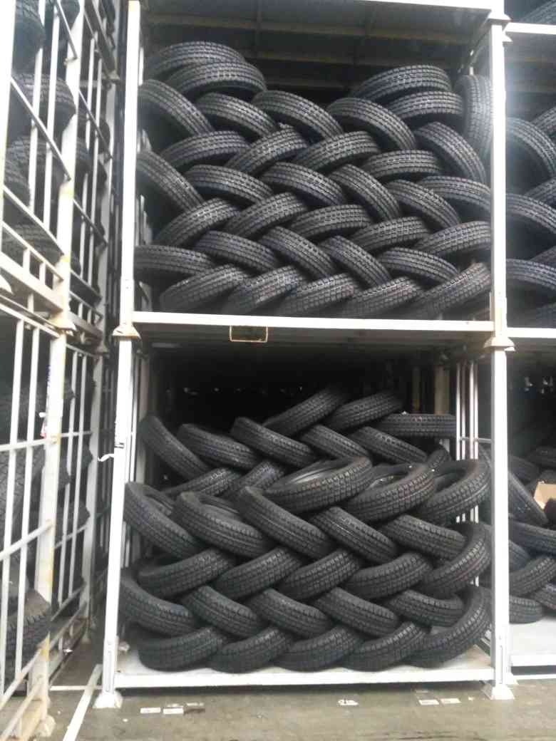 Поддон для хранения шин. Может складываться для хранения. Поддоны могут составляться один на другой в сложенном и разложенном виде.